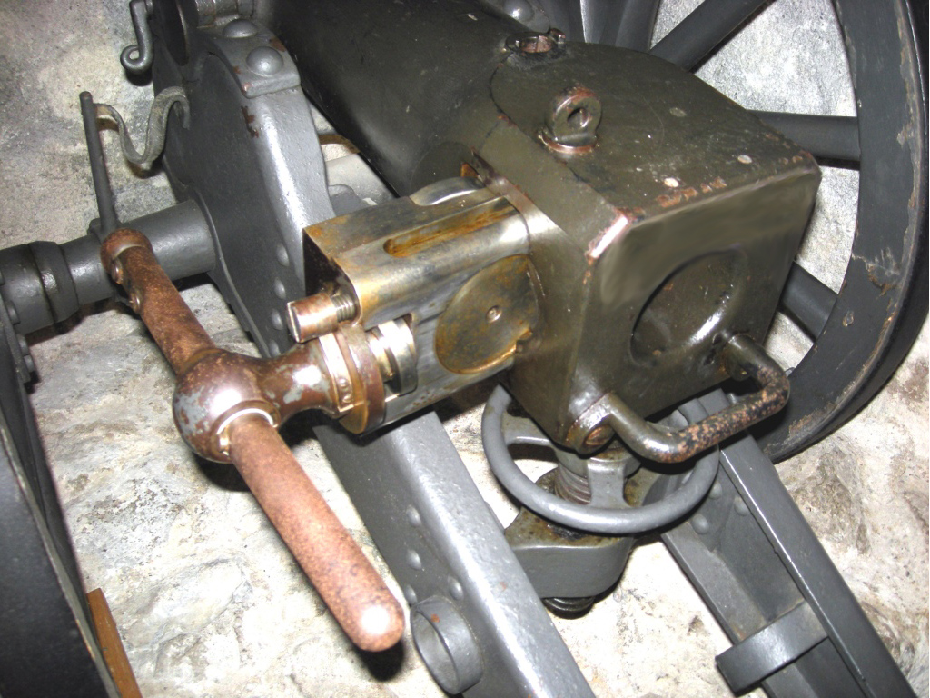 75 mm Geb Kan Verschluss offen